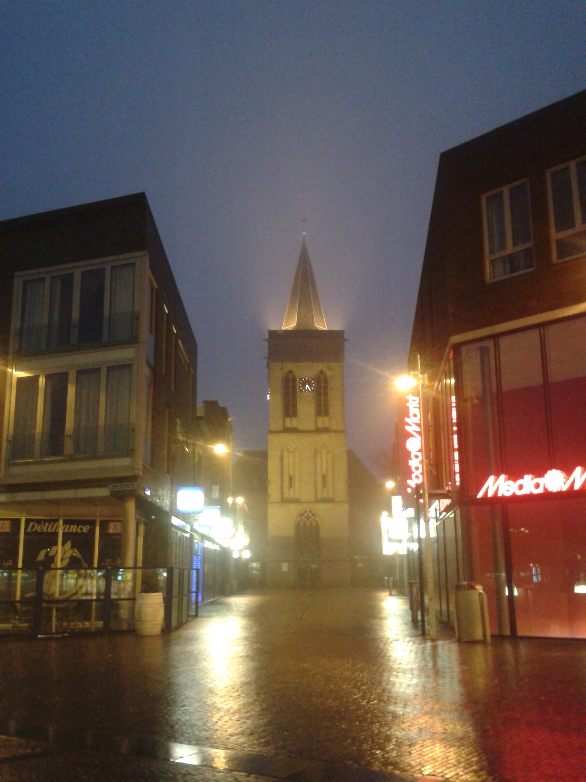 Oude kerk in Ede by night and fog